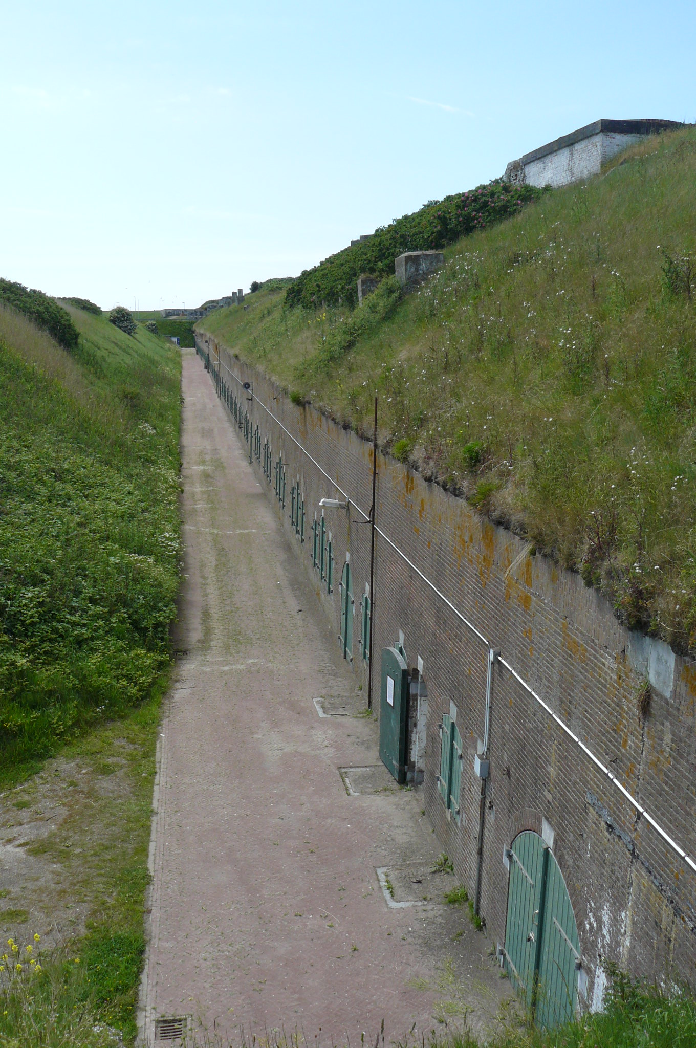 Gebouw Gelderland in het zeefront van Fort Erfprins. Het werd gebouwd van 1876 tot 1878. Het lange gebouw heeft tientallen manschappenverblijven, maar ook een keuken, privaten en zeven munitiekamers. De munitie werd met liften naar het dak getransporteerd waar grote kanonnen met een kaliber van 24 cm stonden opgesteld.